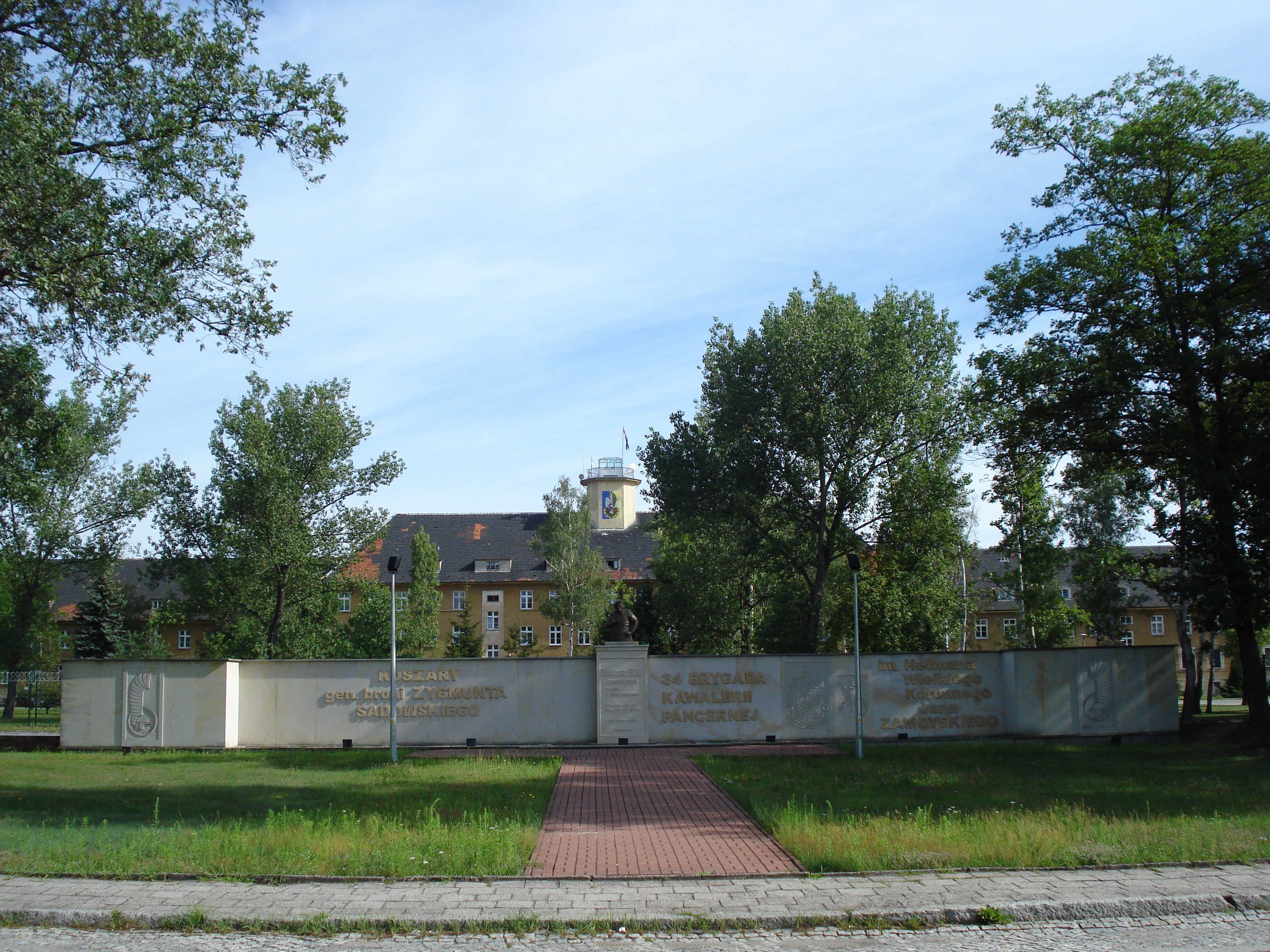 Koszary gen. broni Zygmunta Sadowskiego i pomnik gen. broni Tadeusza Buka w Żaganiu. Widok z ulicy Żarskiej. W głębi budynek sztabu 34 Brygady Kawalerii Pancernej im. htm. w. kor. Jana Zamoyskiego.